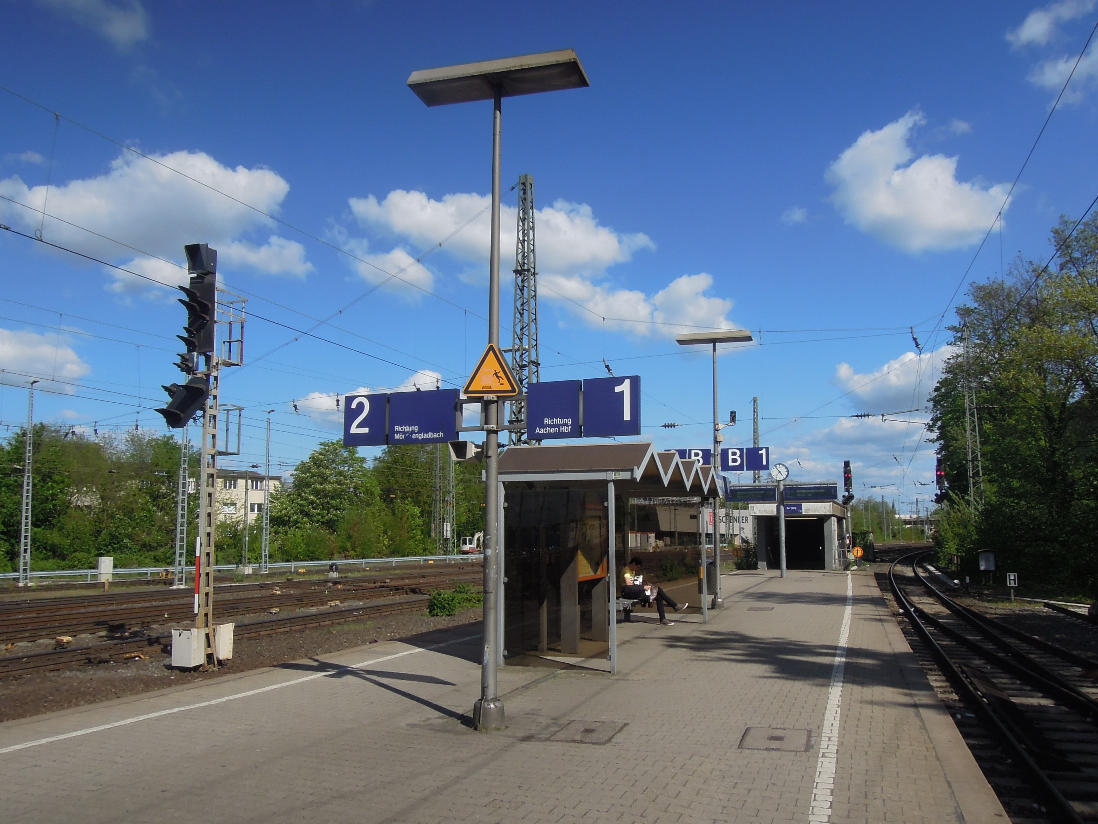 Bahnsteig in Aachen West